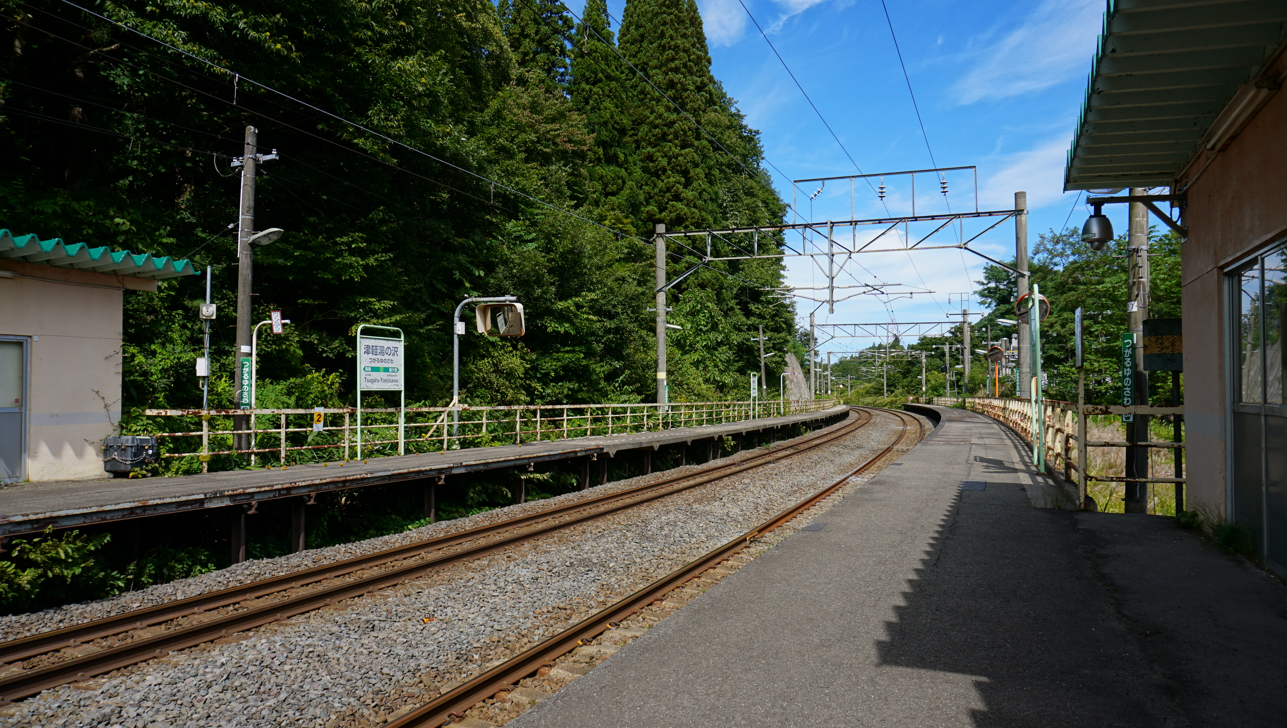 奥羽本線 津軽湯の沢駅（青森県平川市）